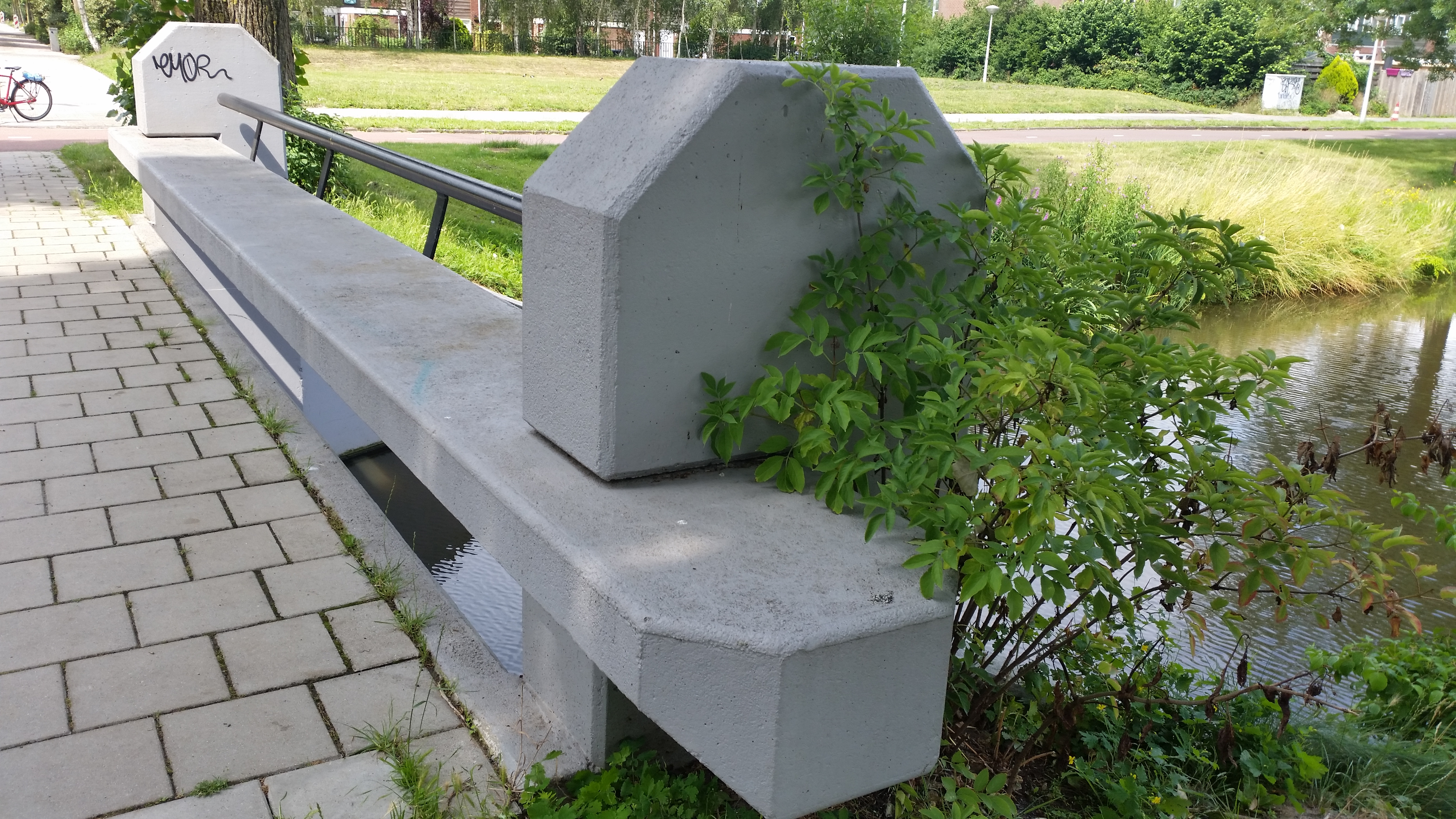 Impressie van brug 1446 in het Steengroevenpad, Amsterdam Zuidoost